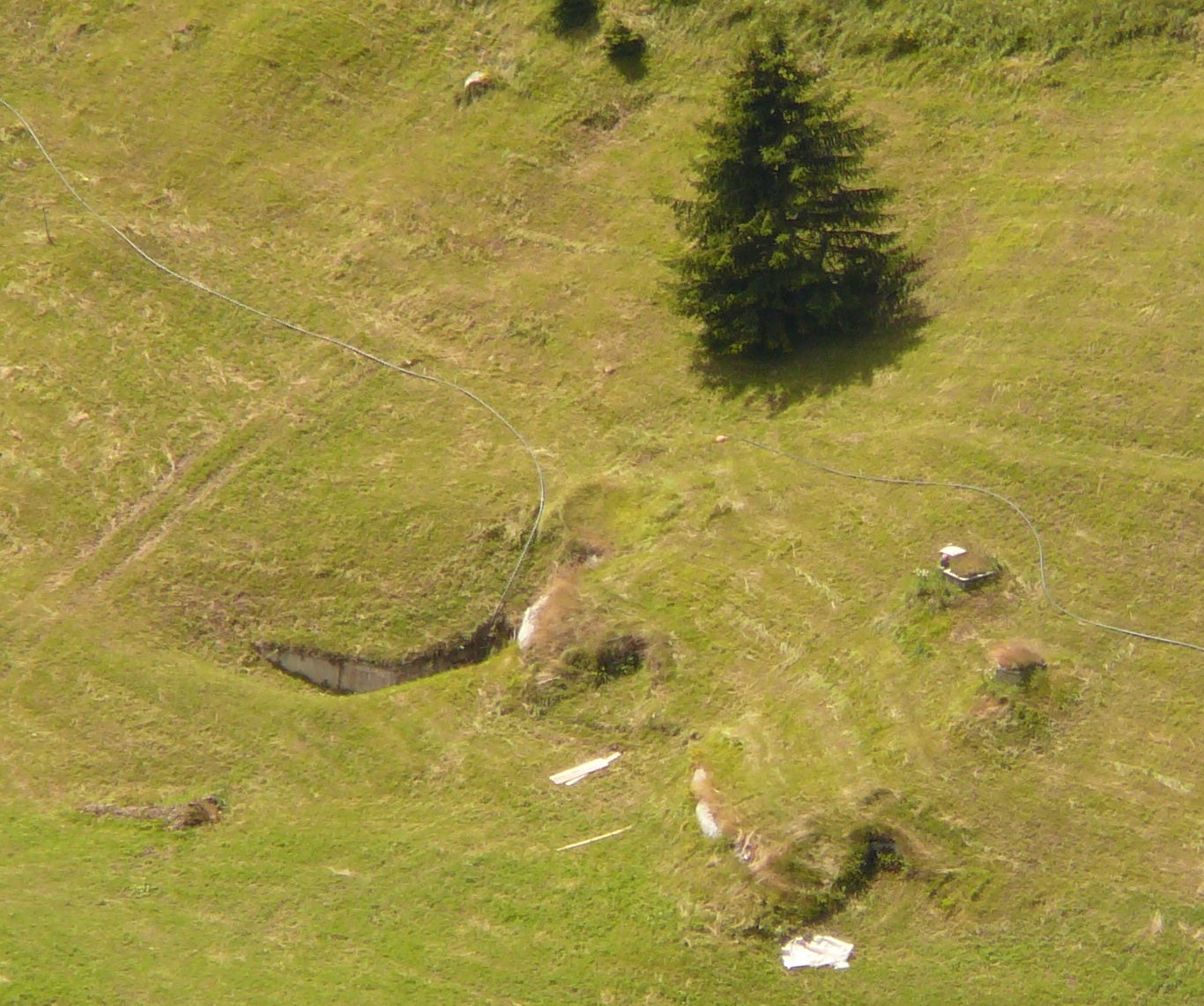 Opera I, sbarramento Resia